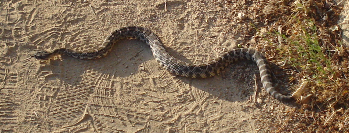 Rattlesnake